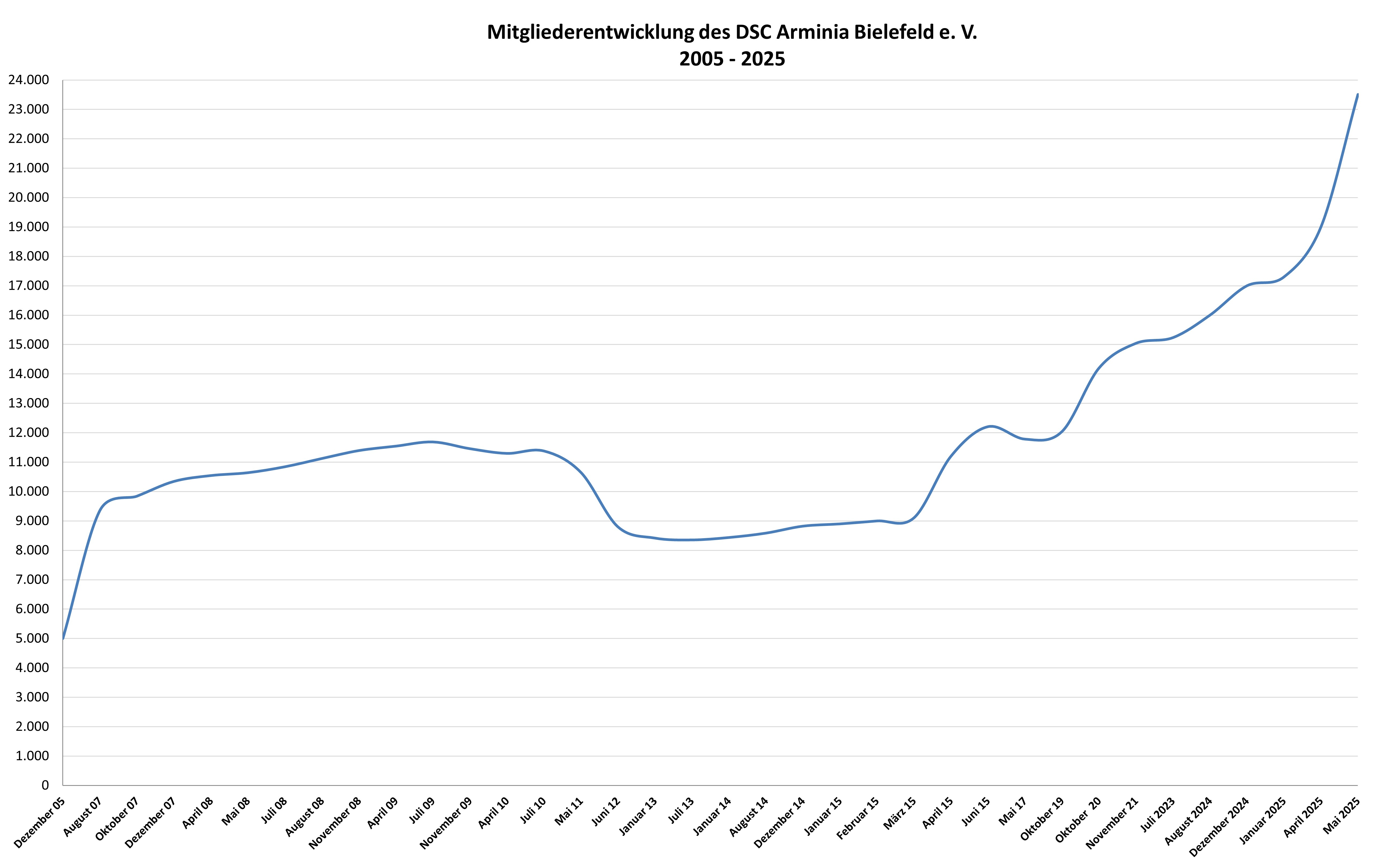 Mitgliederentwicklung des DSC Arminia Bielefeld e.V. in den Jahren 2005 bis 2014. Die Daten stammen aus frühen Versionen des Arminia Bielefeld Artikels in der deutschen Wikipedia und/oder aus archivierten Versionen der Arminia Homepage (genaue Quellenangaben können beim Autor erfragt werden). Diese beruhen allesamt auf Zahlen, die auf der offiziellen Homepage des Vereins veröffentlicht wurden und von den Autoren des Artikels regelmäßig aktualisiert wurden (teilweise zur Erstellung dieser Grafik validiert durch ). Die Aktualisierungen auf der Arminia-Homepage erfolgten in unregelmäßigen Abständen, daher ist die Verteilung der Datenpunkte für einzelne Jahre unterschiedlich dicht. Insbesondere in der Zeit zwischen Mai 2011 und Januar 2013, in der die Mitgliederzahl deutlich sank, wurden keine Aktualisierungen vorgenommen (in Zeiten deutlichen Mitgliederzuwachses (z.B. 2007) gab es demgegenüber zwischenzeitlich einen Live-Ticker, der die aktuelle Mitgliederzahl darstellte, Aus den Jahren vor 2007 konnte lediglich das Überschreiten der 5000 Mitgliedermarke recherchiert werden. Verwendete Datenreihe: Stand Mitglieder April 15: 11.200; März 15: 9.105; Februar 15: 9.003; Dezember 14: 8.823; August 14: 8.586; Januar 14: 8.437; Juli 13: 8.354; Januar 13: 8.417; Juni 12: 8.800; Mai 11: 10.651; Oktober 10: 11.380; April 10: 11.298; November 09: 11.458; Juli 09: 11.687; Mai 09: 11.545; November 08: 11.394; August 08: 11.124; Juli 08: 10.843; Mai 08: 10.641; April 08: 10.544; Dezember 07: 10.345; Oktober 07: 9.842; August 07: 9.356; Dezember 05: 5.000